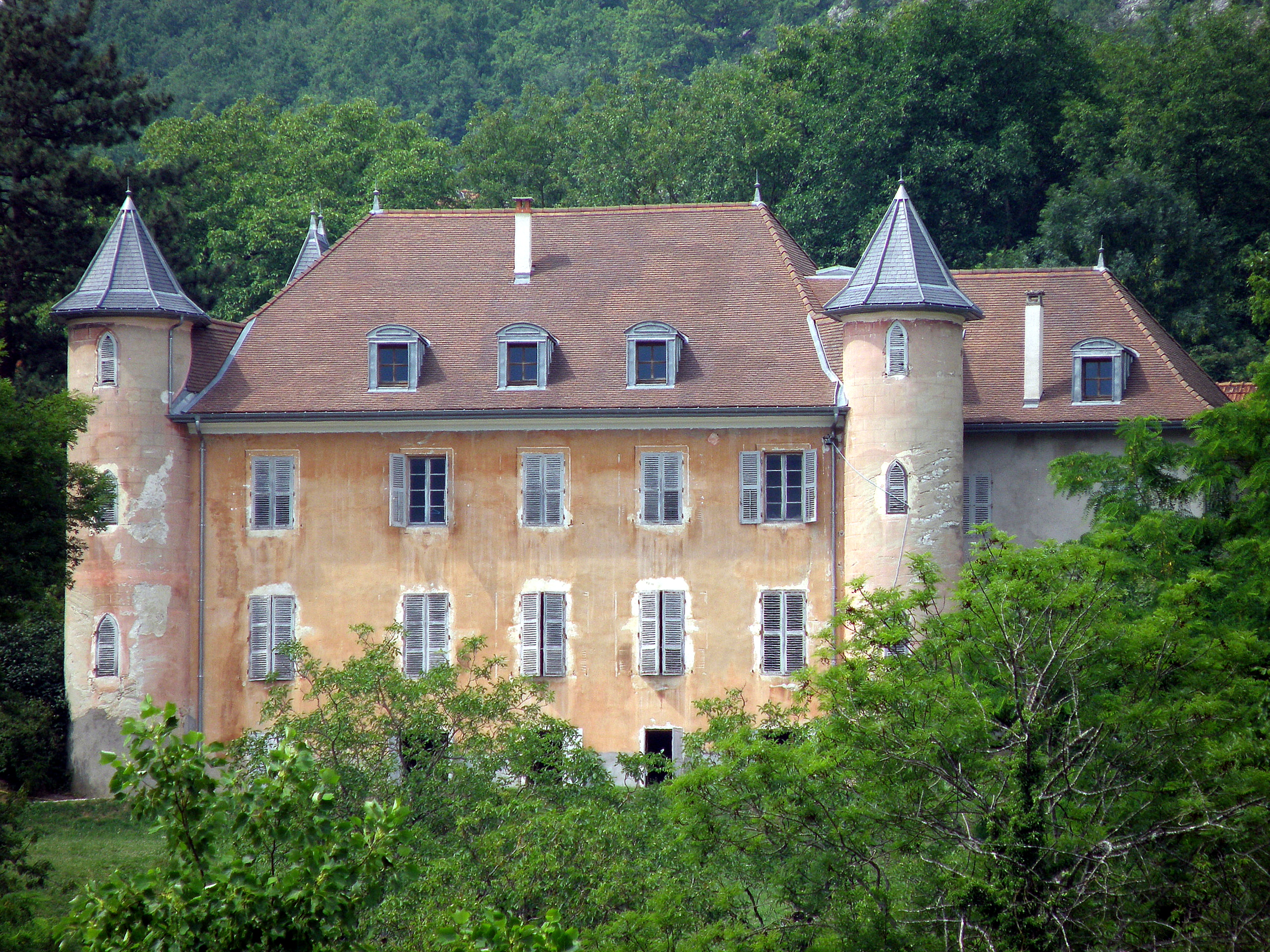 Billième (dép. de la Savoie, France). Château de Bornessand.